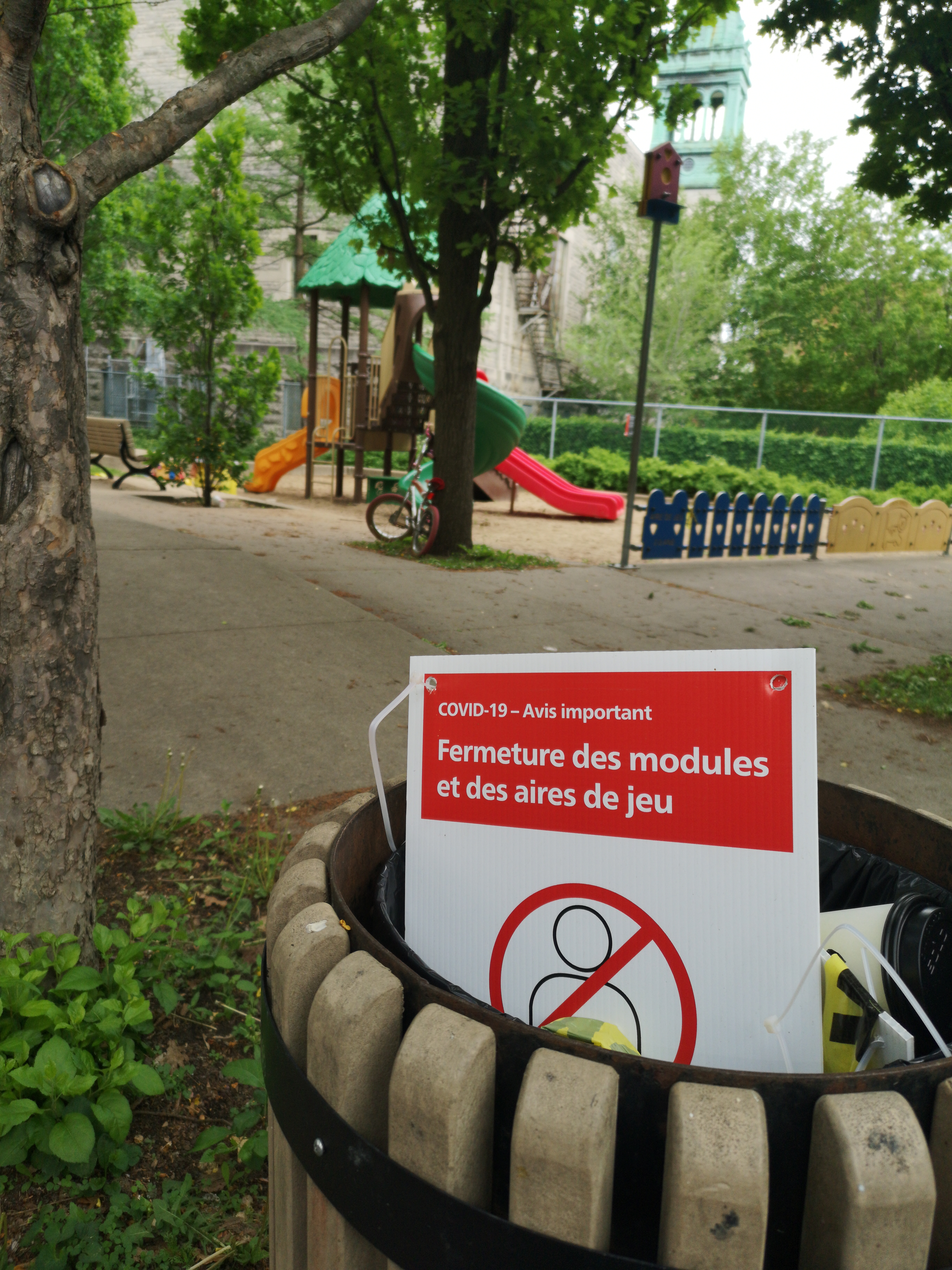 Affiche indiquant la fermeture des aires de jeux à la Ville de Montréal dans une poubelle en avant-plan du parc Saint-Vincent-Ferrier. Suite à une annonce de la Sécurité publique indiquant que les piscines et aires de jeu pouvaient rouvrir, les citoyens retirent eux-mêmes les signes d'interdiction et bandeau indiquant que l'accès est interdit, avant que les autorités municipales, responsables, n'aient le temps de réagir.